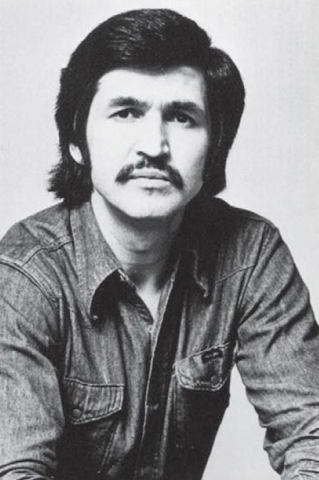 Tomasz Strzyżewski 1977 roku w Szwecji